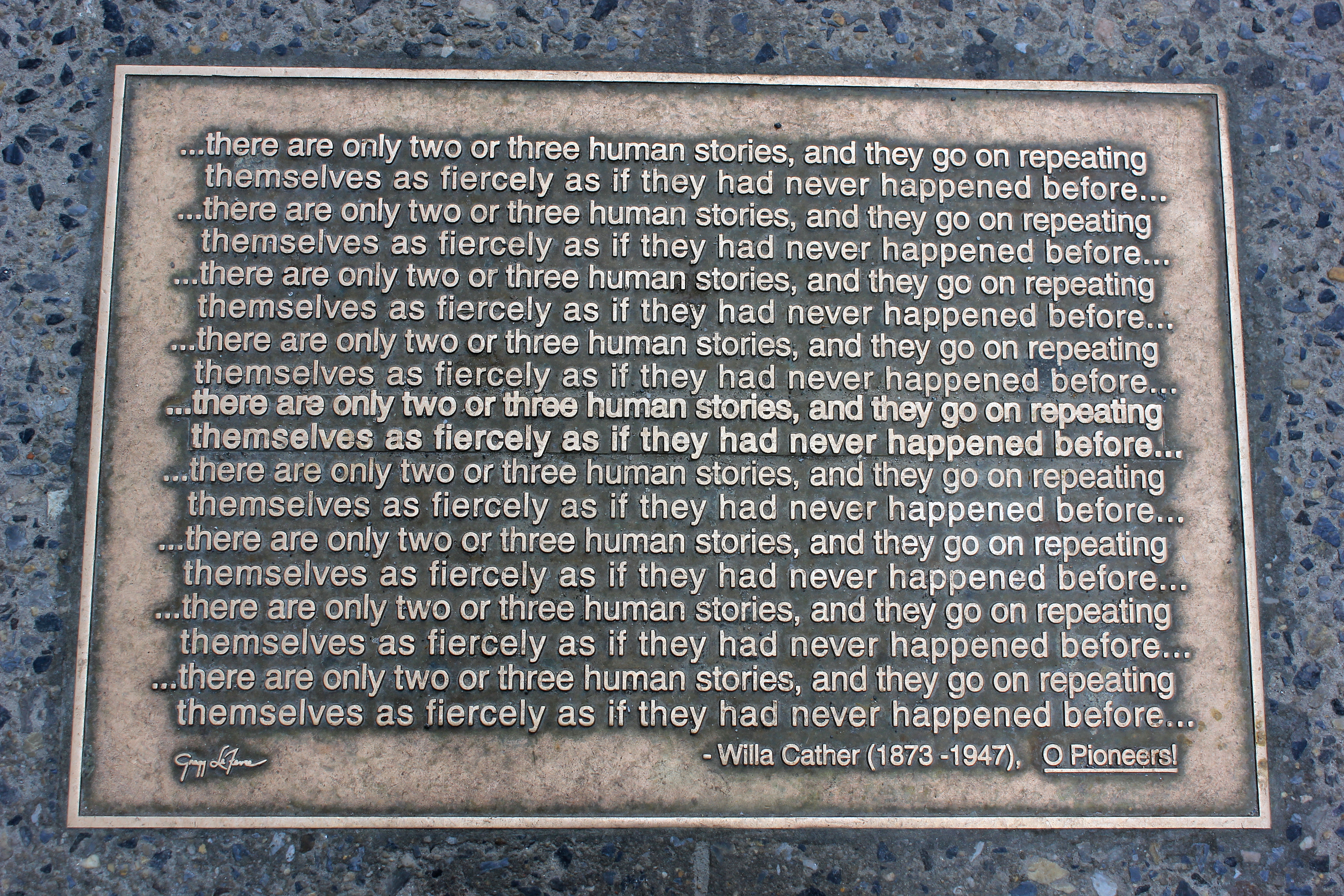 Library Walk New York City